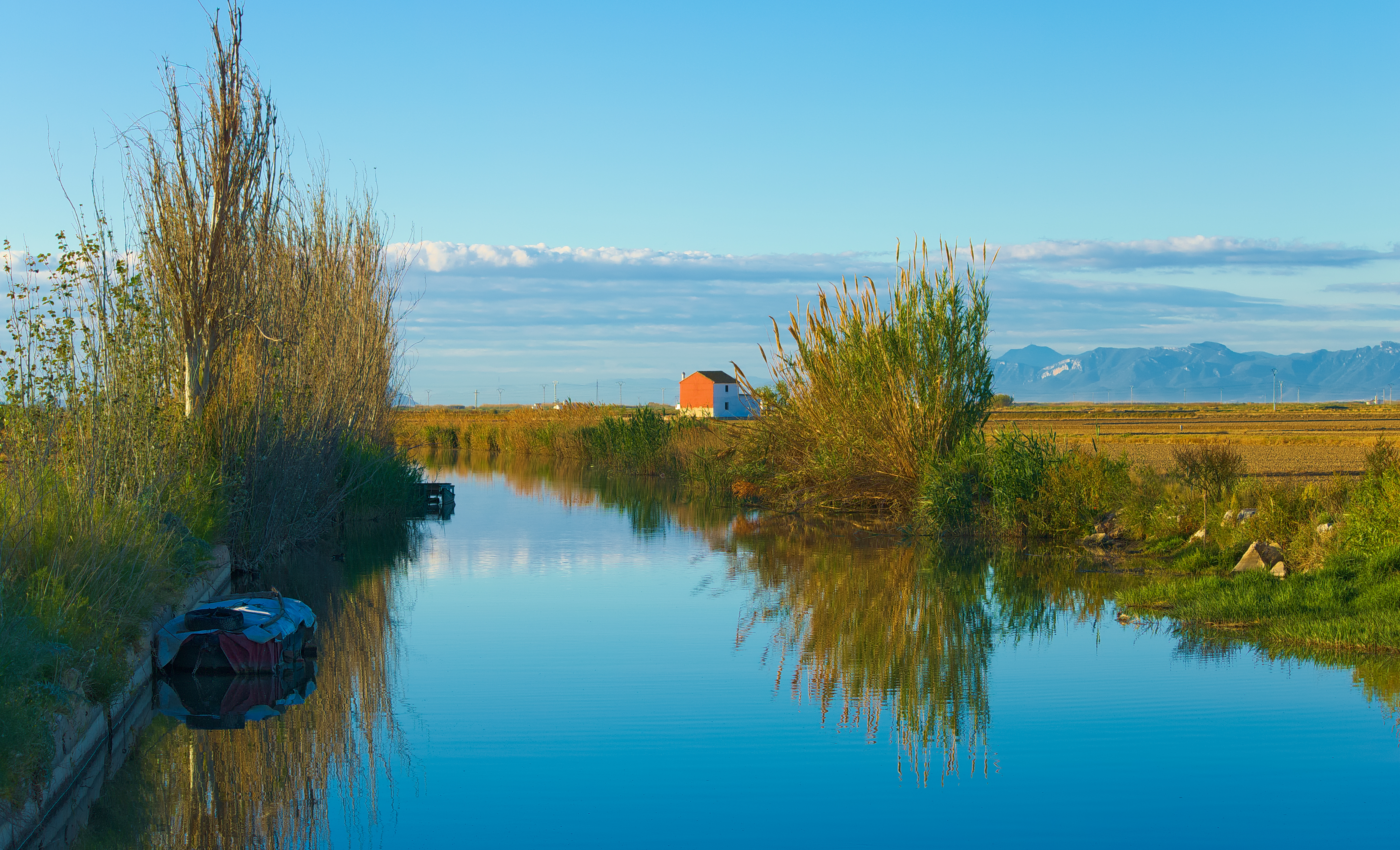 La Albufera This is a photography of a Site of Community Importance in Spain with the ID: ES0000023. Natura2000 entry, EEA entry